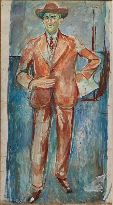 Bildnis von Eberhard Grisebach (* 27. Februar 1880 in Hannover; † 16. Juli 1945 in Zürich) - deutscher Philosoph